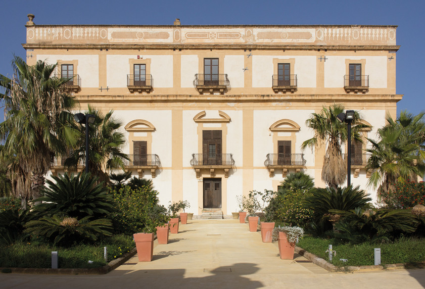 Facciata laterale del museo Guttuso